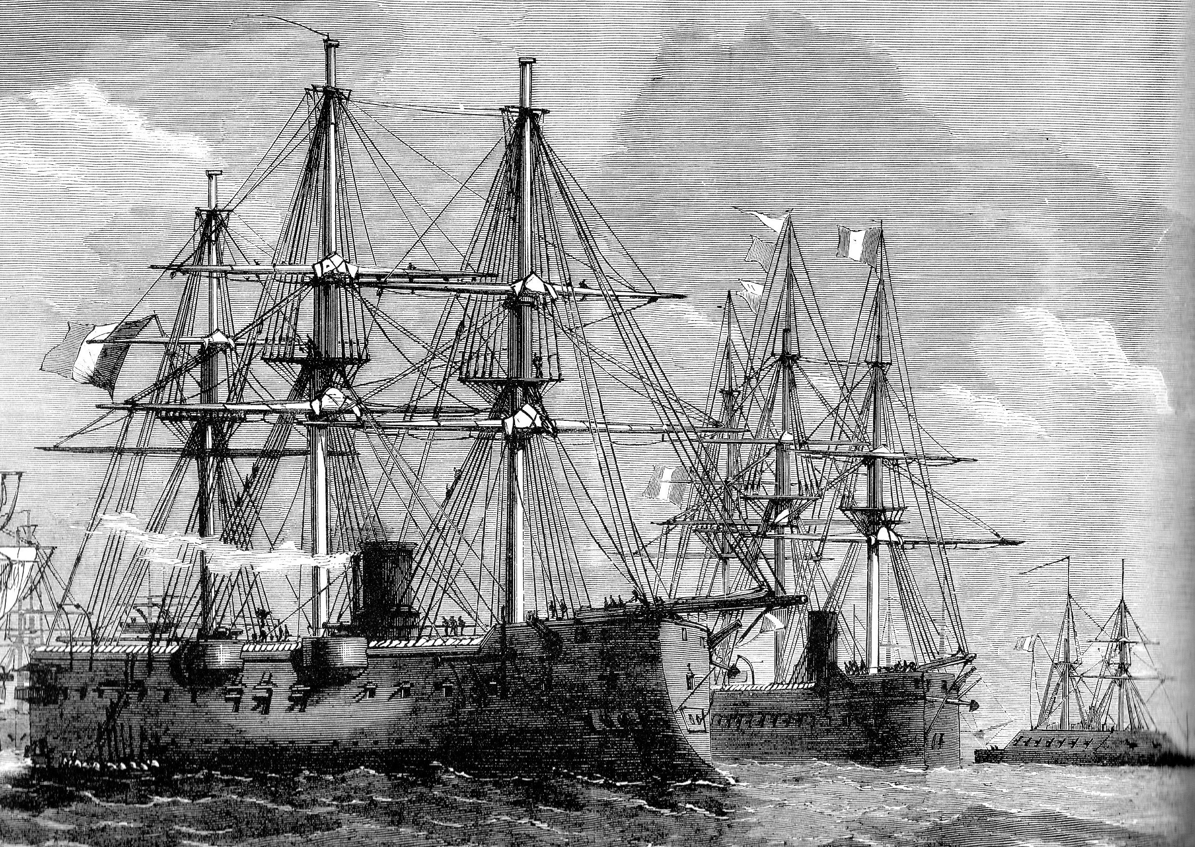 Das französische Ostseegeschwader mit (von links) den Panzerfregatten OCÉAN und SURVEILLANTE sowie dem Widderschiff ROCHAMBEAU. Abbildung aus der Illustrirten Zeitung von 1870